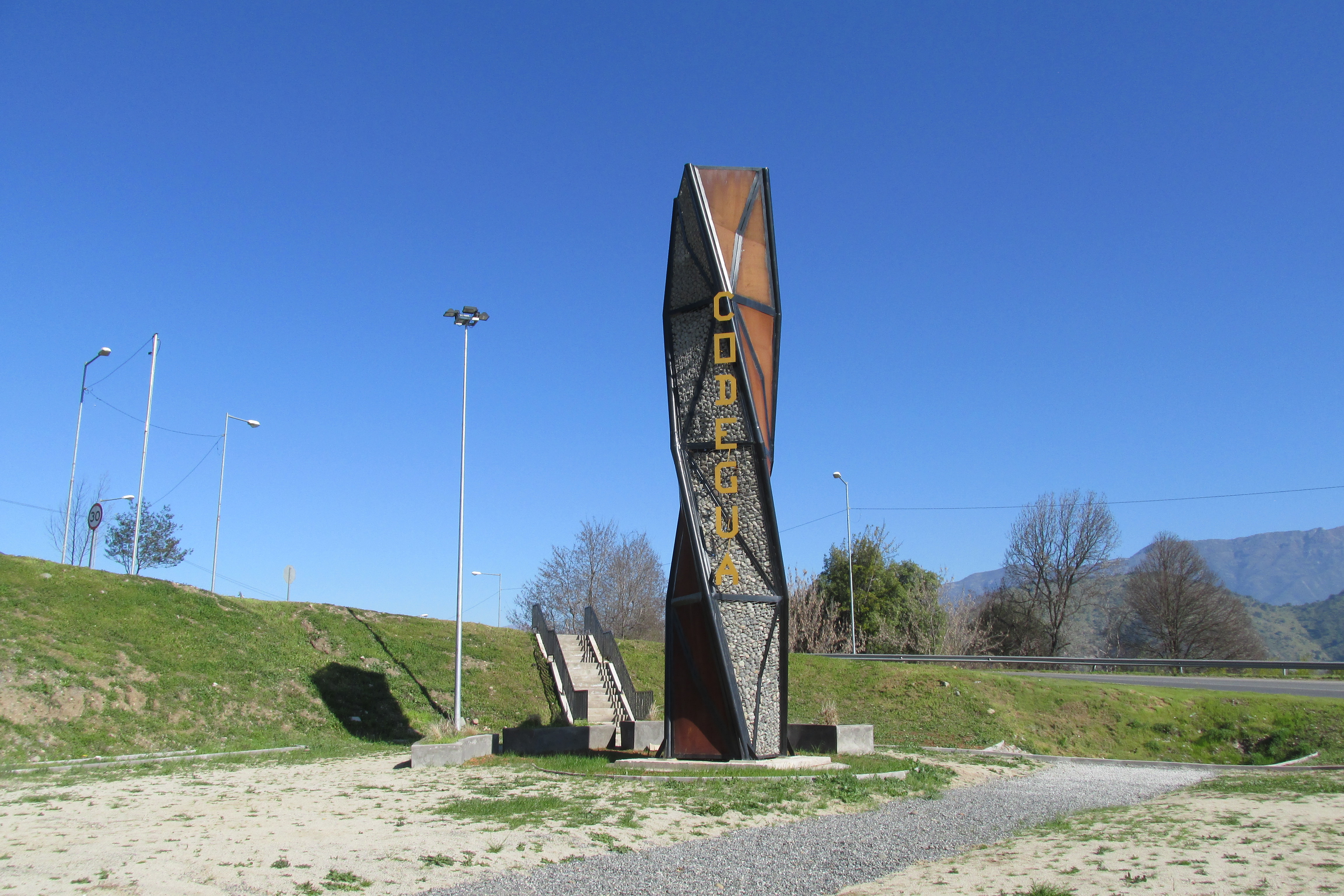 Señal de entrada a la comuna de Codegua en la Región del Libertador Bernardo O"Higgins